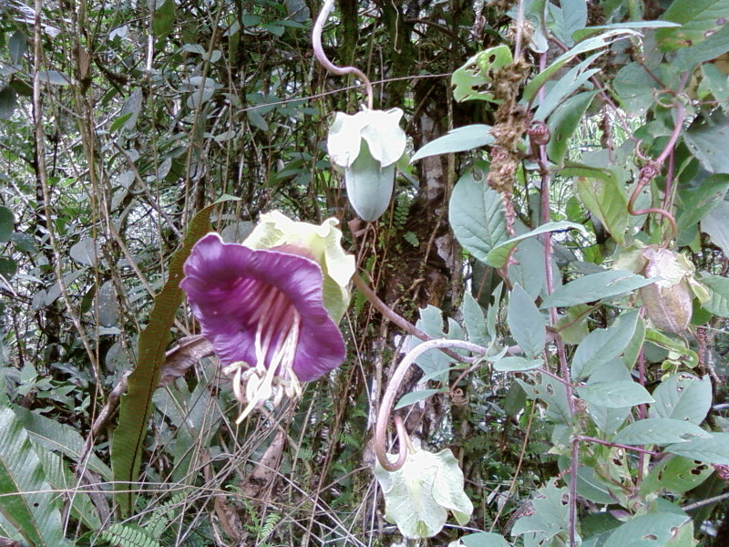 Cobée grimpante, Pérou (région du Machu Pichu)